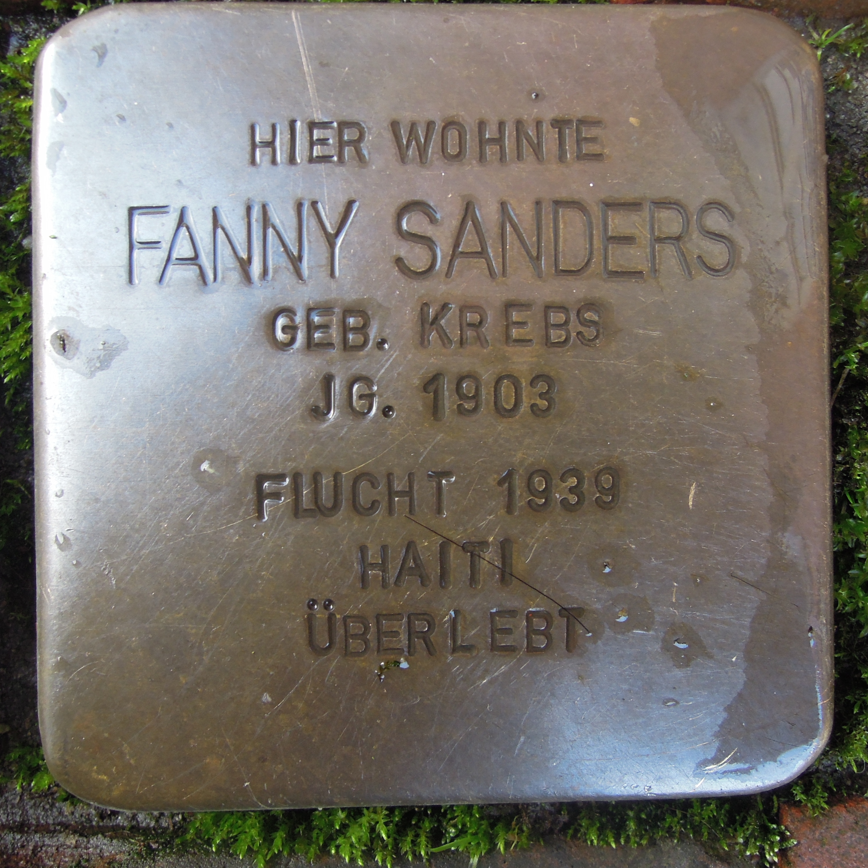 Stolperstein in Straelen, Mühlenstraße 10 für Fanny Sanders